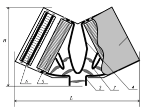 Дугогасительная камера быстродействующего выключателя ВАБ-49